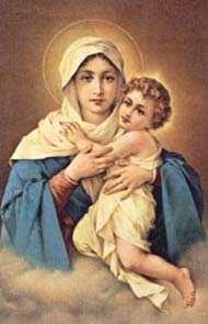 Imagen de la Virgen, Madre y Reina Tres Veces Admirable de Schoenstatt Autor del óleo: Luigi Crosio Propietario actual de la imagen: Movimiento de Schoenstatt Dado que Luigi Crosio murió en 1915, se entiende en el dominio público por antigüedad